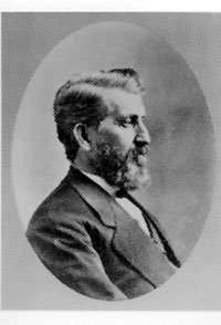 Portrait des Billardtischherstellers John Moses Brunswick